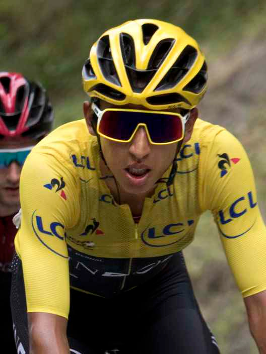 ALP20240 bernal